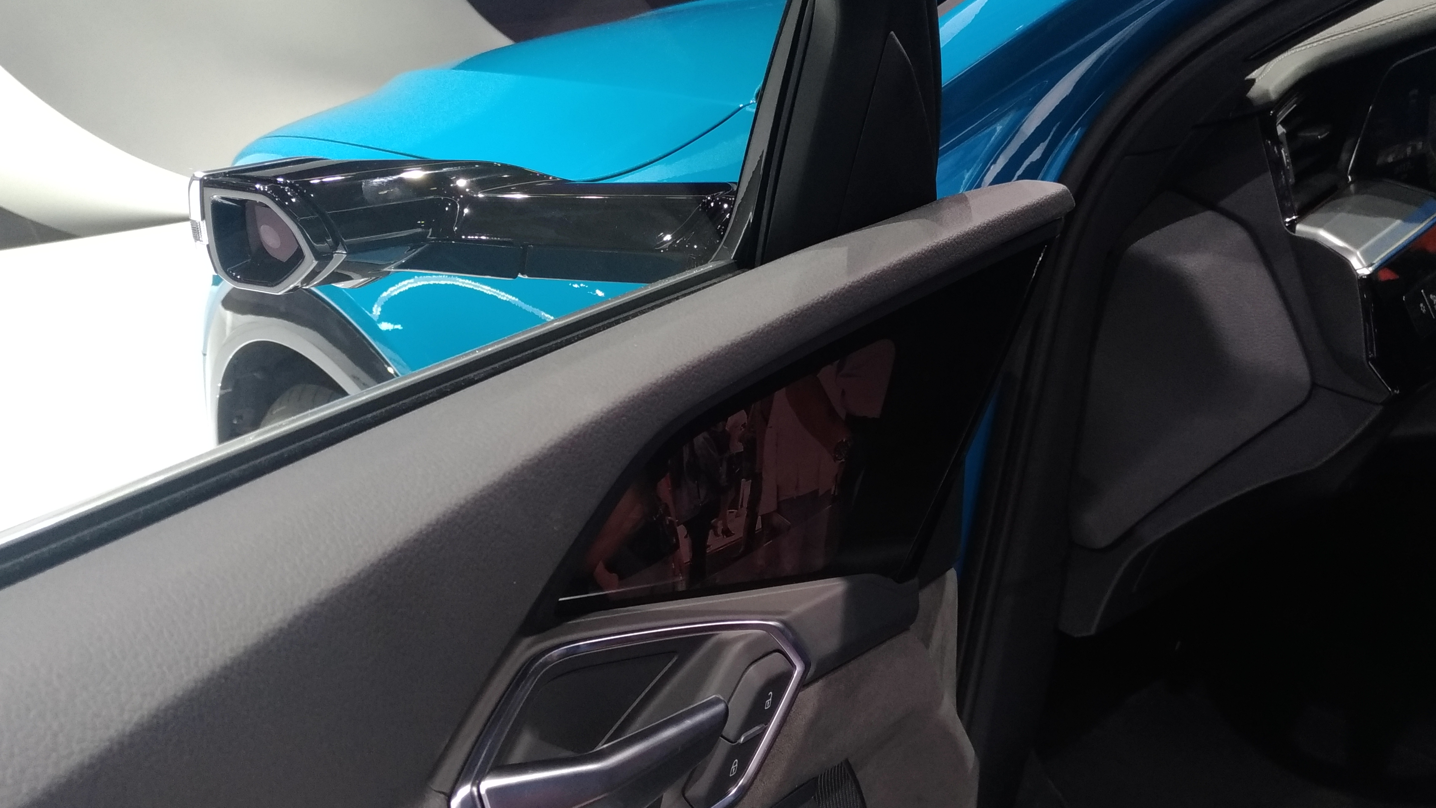 Rétrovision par caméra de l'Audi e-tron quattro